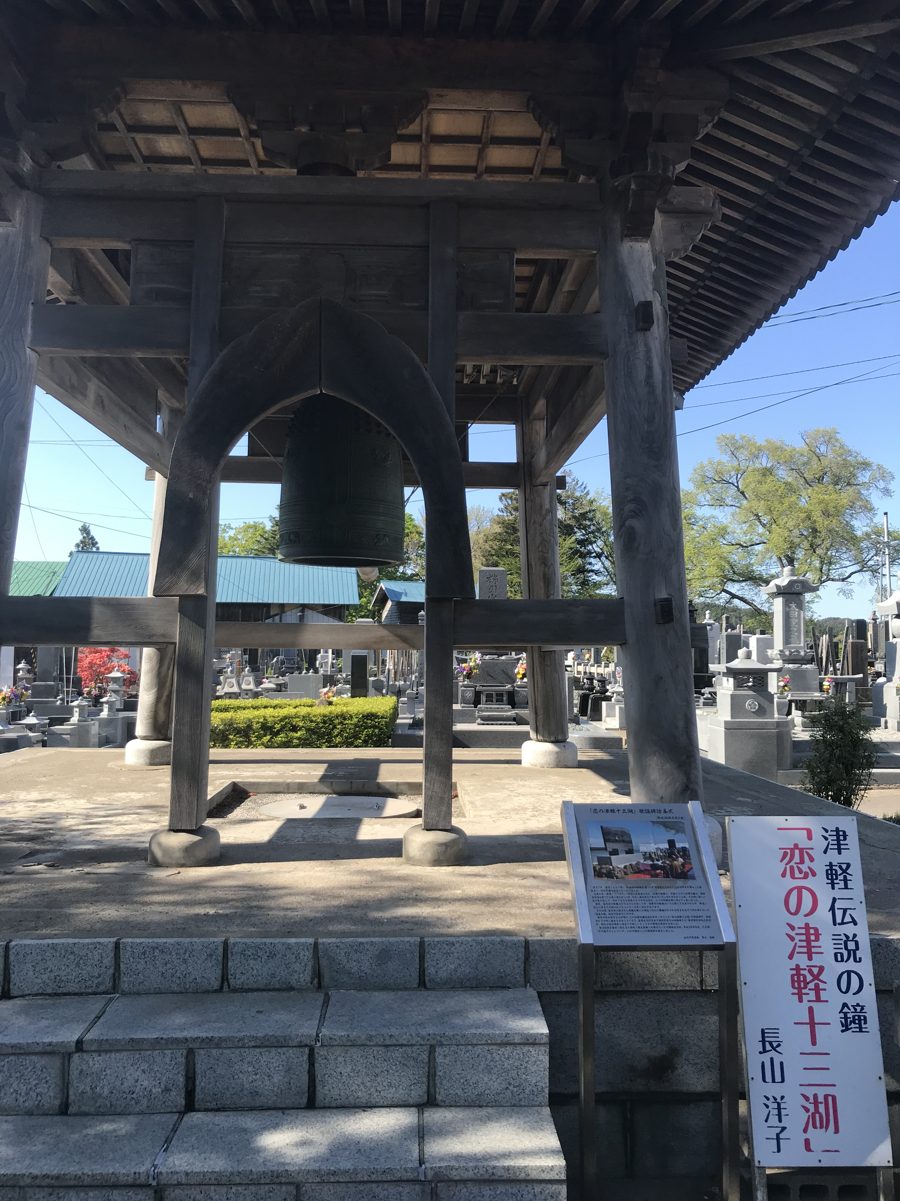 伝説ではもう一対の鐘が十三湖に沈んでいるといわれている。